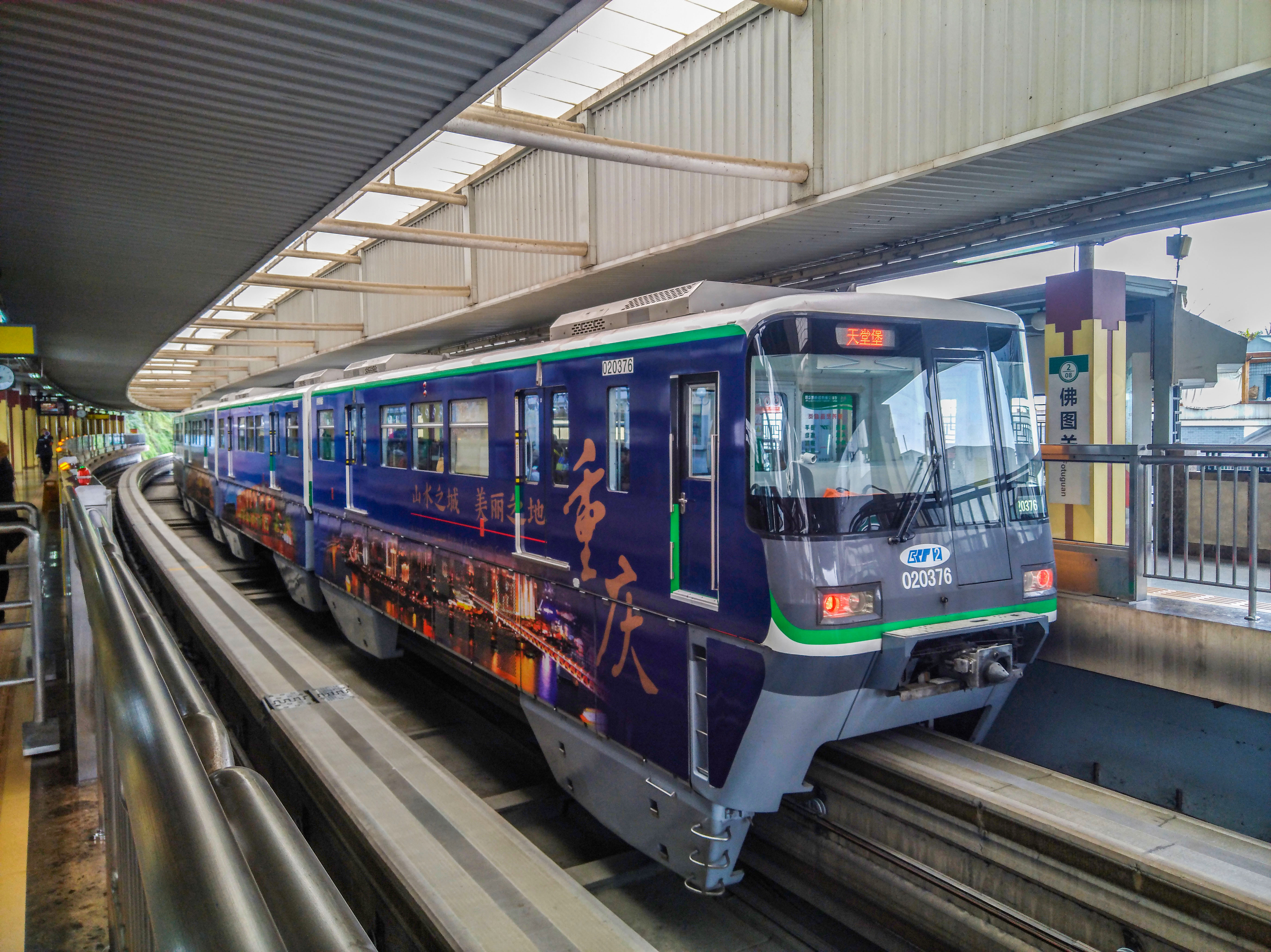 佛图关站